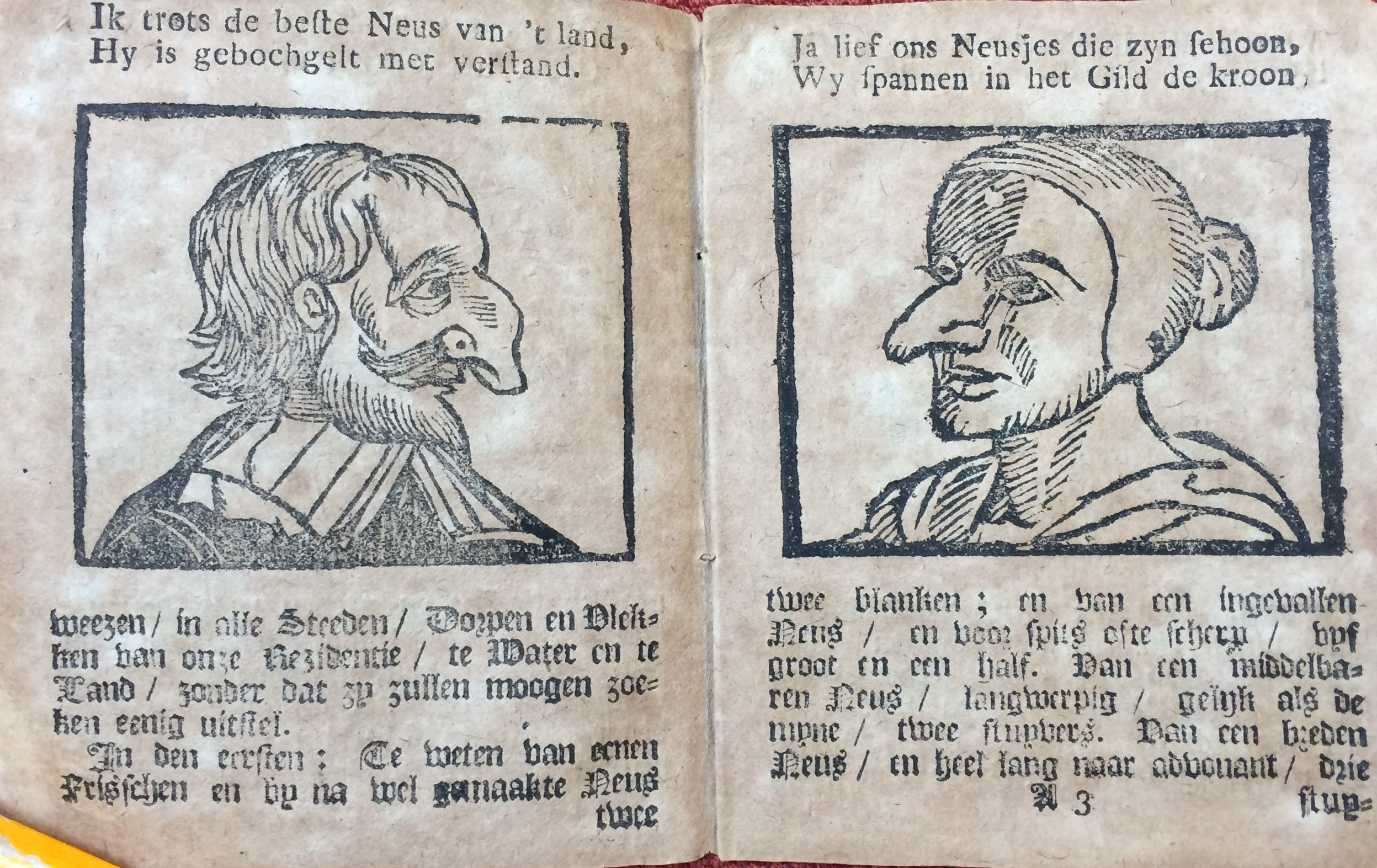 Conservé dans le Deventer almanach pour l’année 1787 (Deventer, Athenaeumbibliotheek, Dv V.302:1787).